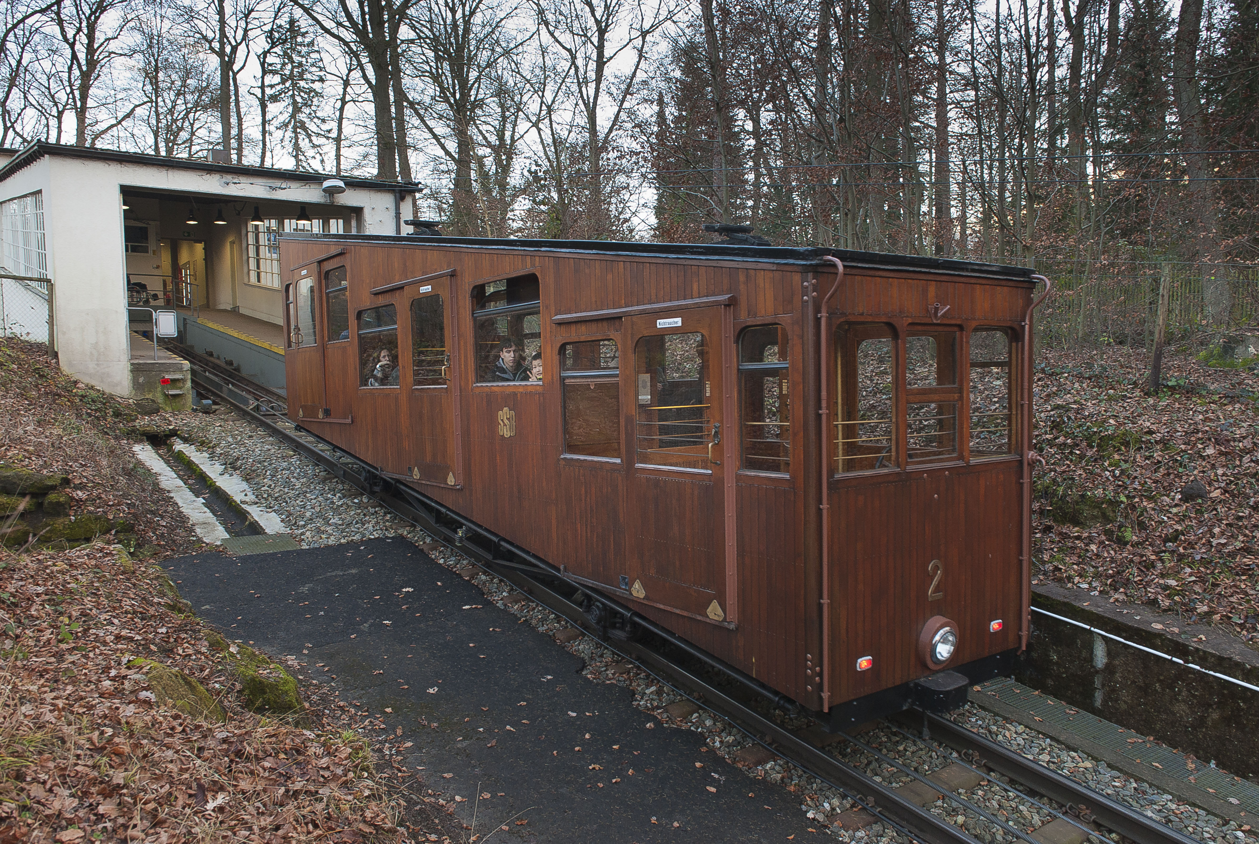 Standseilbahn Stuttgart. Wagen 2 bei der Einfahrt in die Bergstation